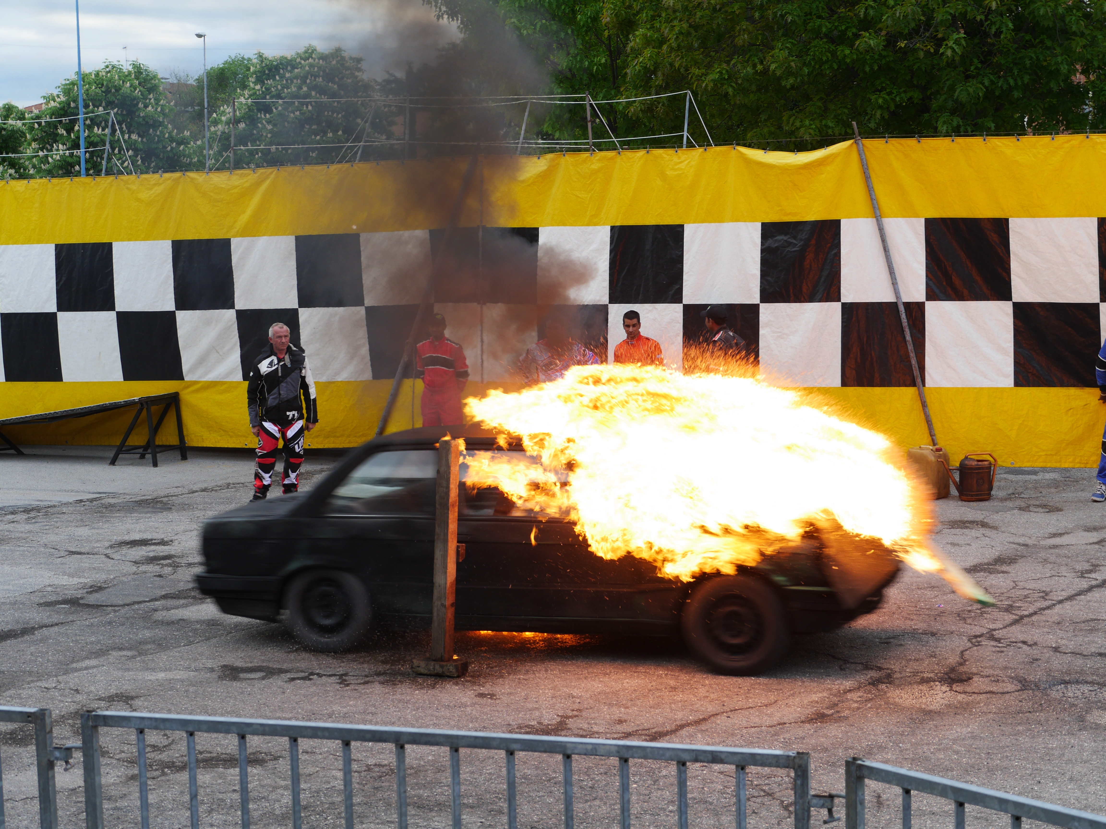 This photo was taken with Panasonic Lumix DMC-GH3 camera, thanks to Panasonic. You can see all photographs in category: Taken with Panasonic Lumix DMC-GH3.